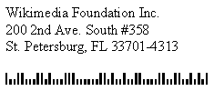 Zip plus 4